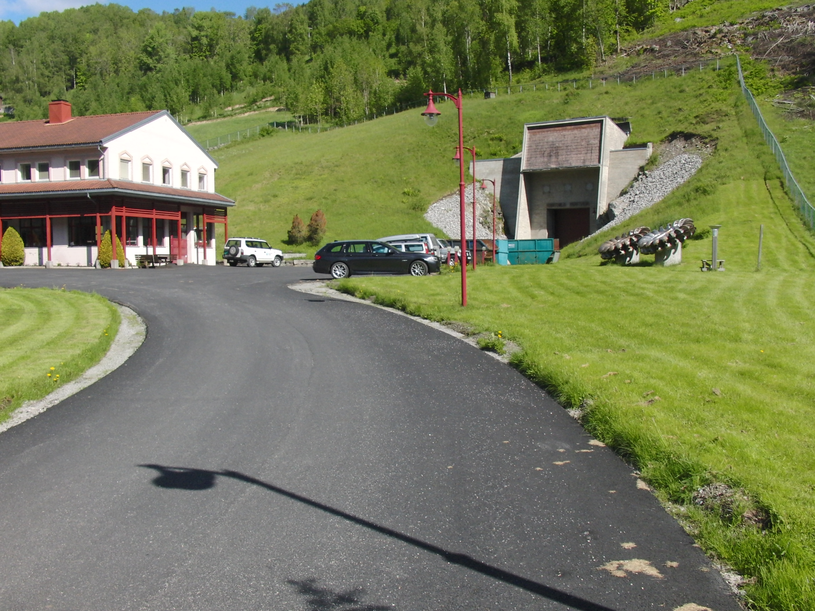 Hjartdøla kraftverk